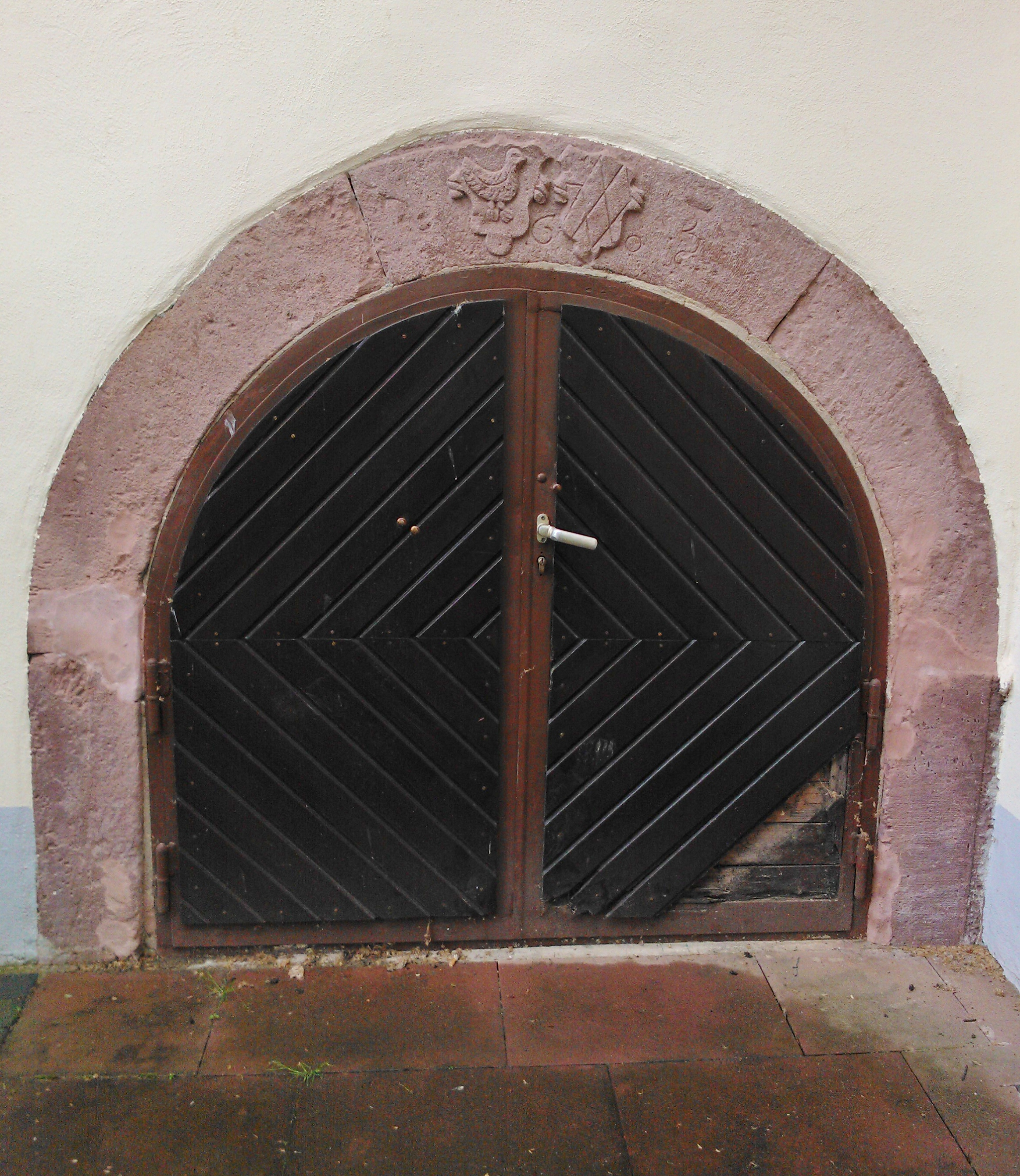 St. Josephshaus in Klein-Zimmern, ehemalige Wasserburg. Südflügel; Portal, Doppelwappen Gans v. Otzberg / Daun